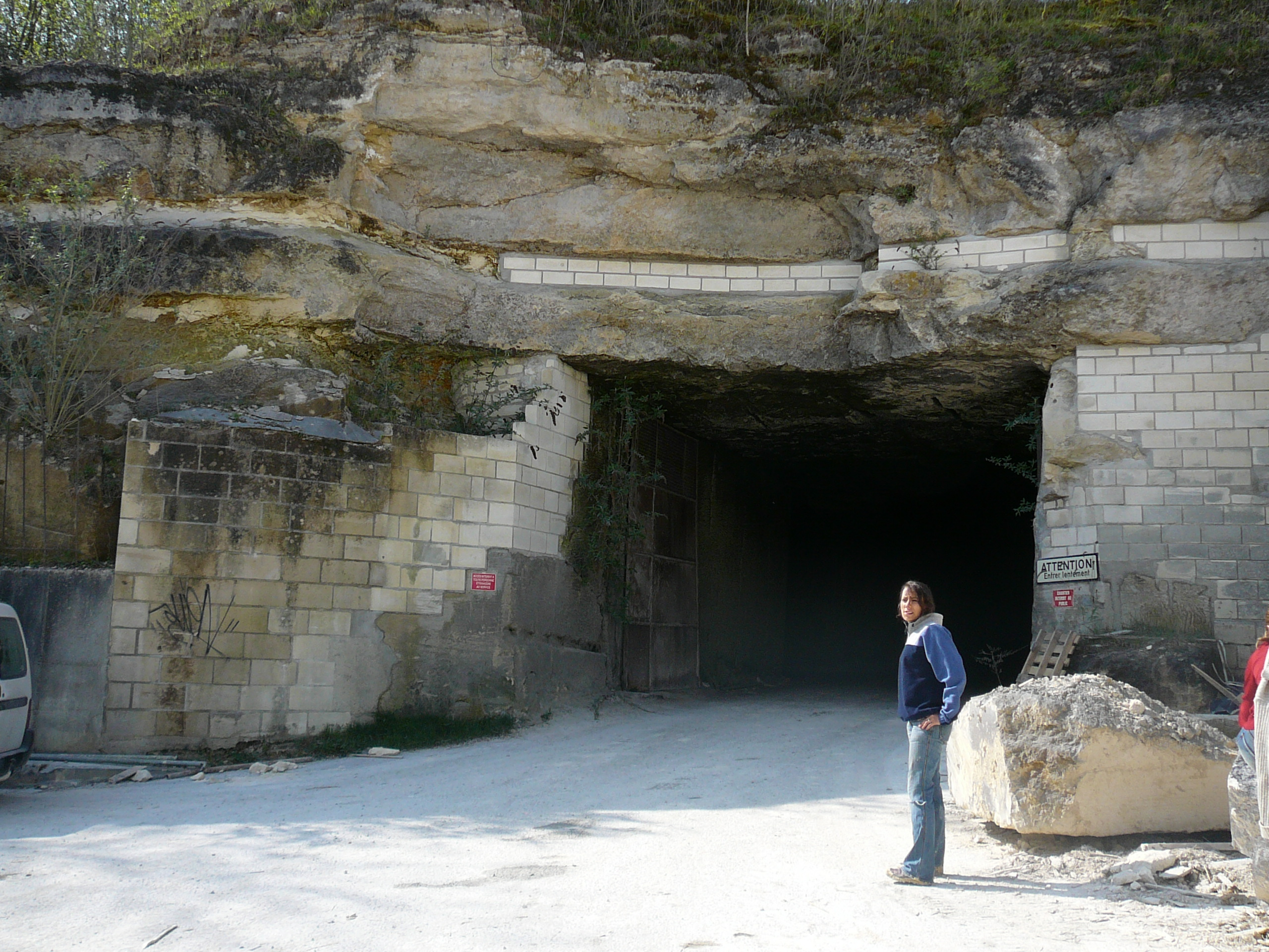 Entrée de la carrière de Bonneuil-en-Valois, Picardie, France Auteur : So Leblanc, 2007